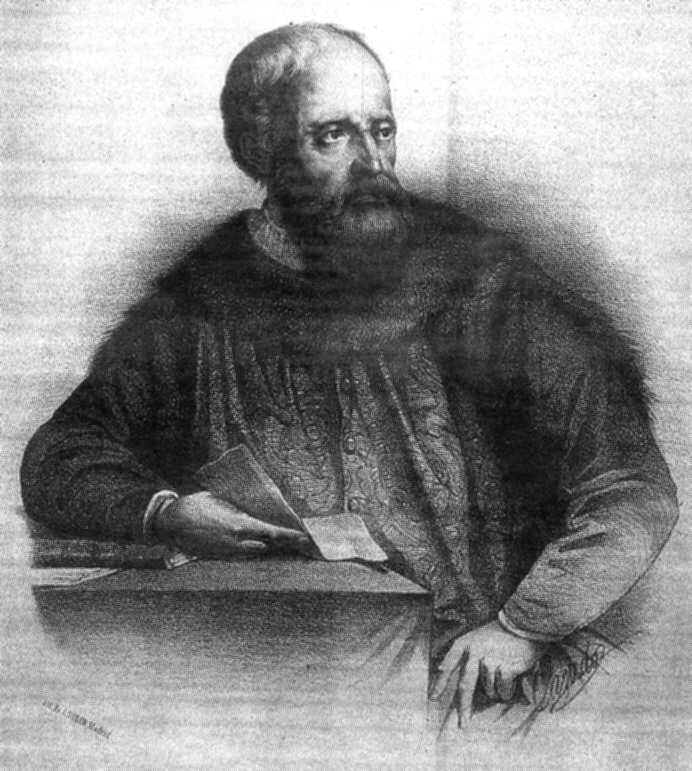 Retrato de Ruy González de Clavijo